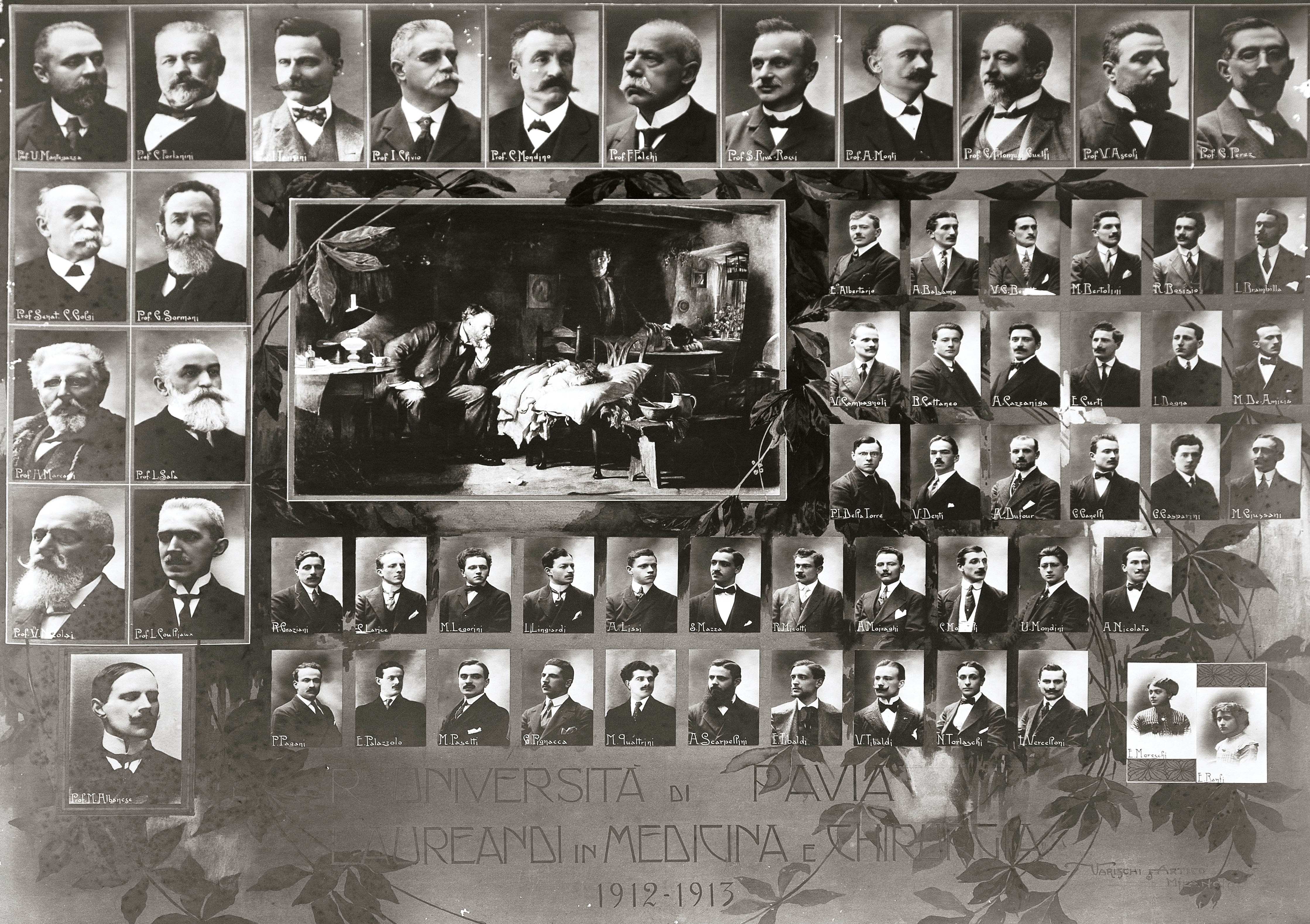 Foto di laurea in medicina dell'Università di Pavia di Pier Luigi Della Torre